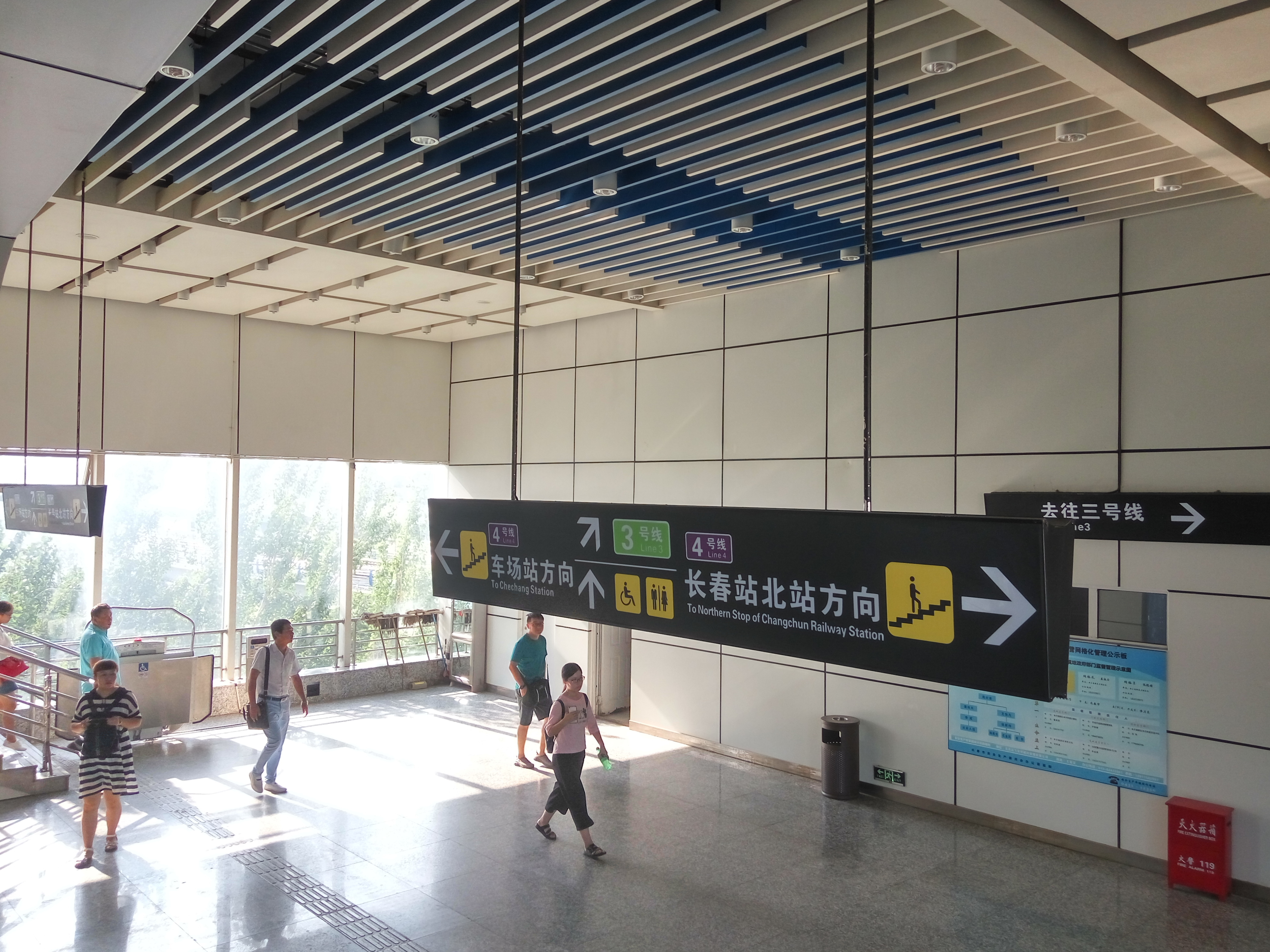 4号线职业学院站导向牌